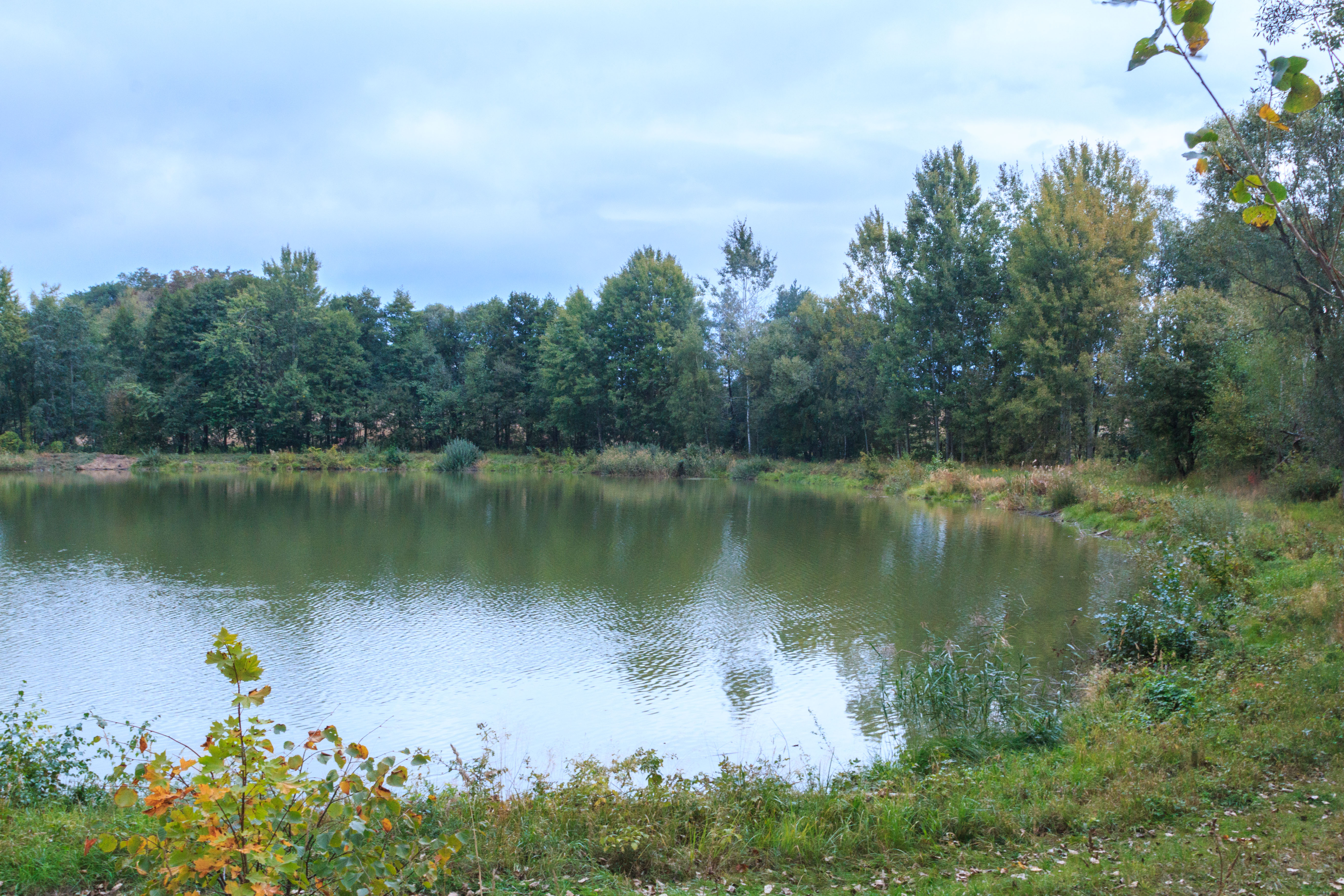 Rybník Ještědka Project: Vodstvo.